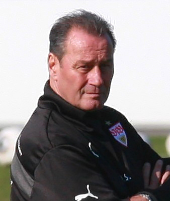 Huub Stevens. Cheftrainer beim VfB Stuttgart. Aufgenommen von